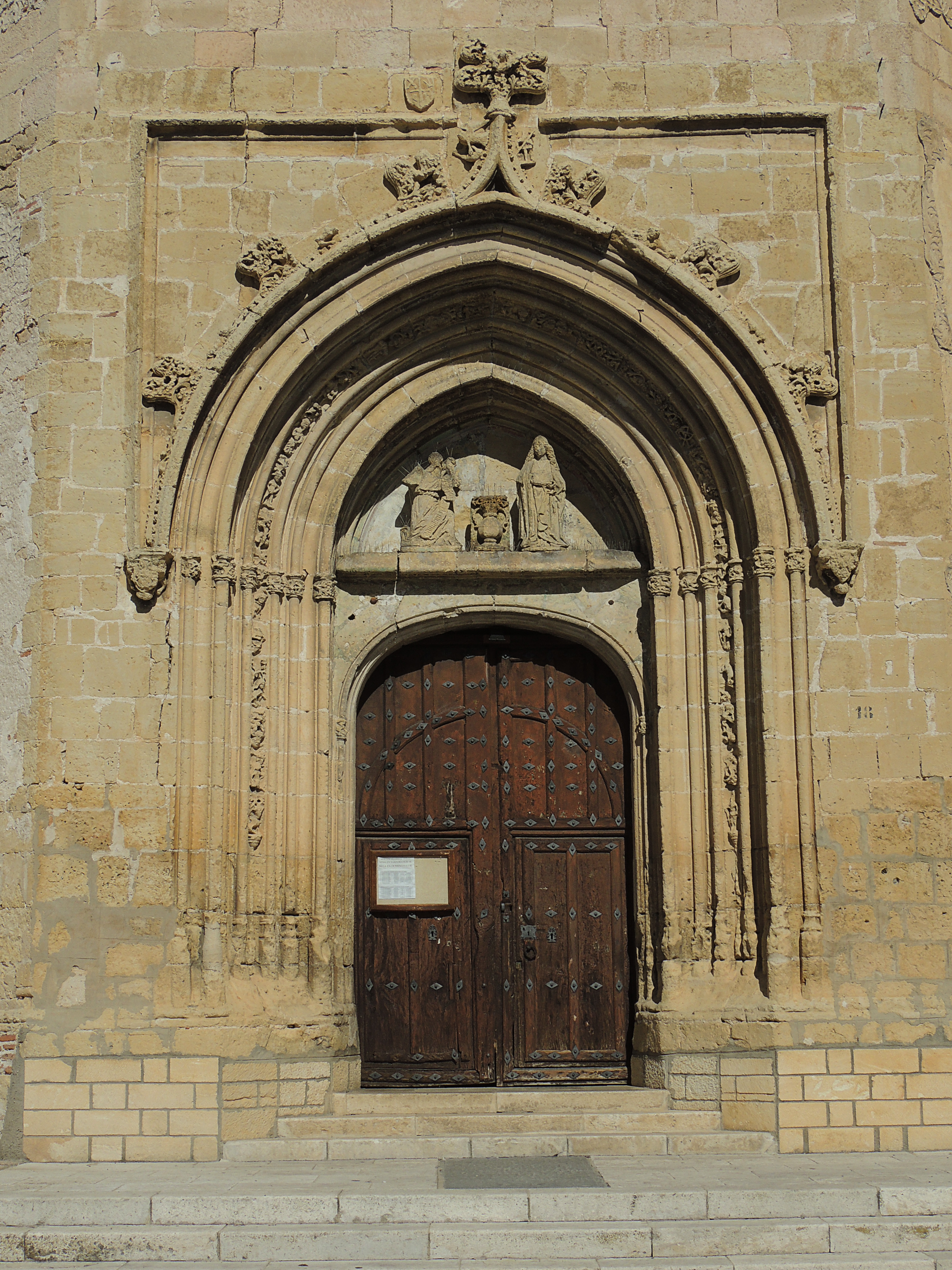 Aguilafuente - Iglesia de Santa Maria